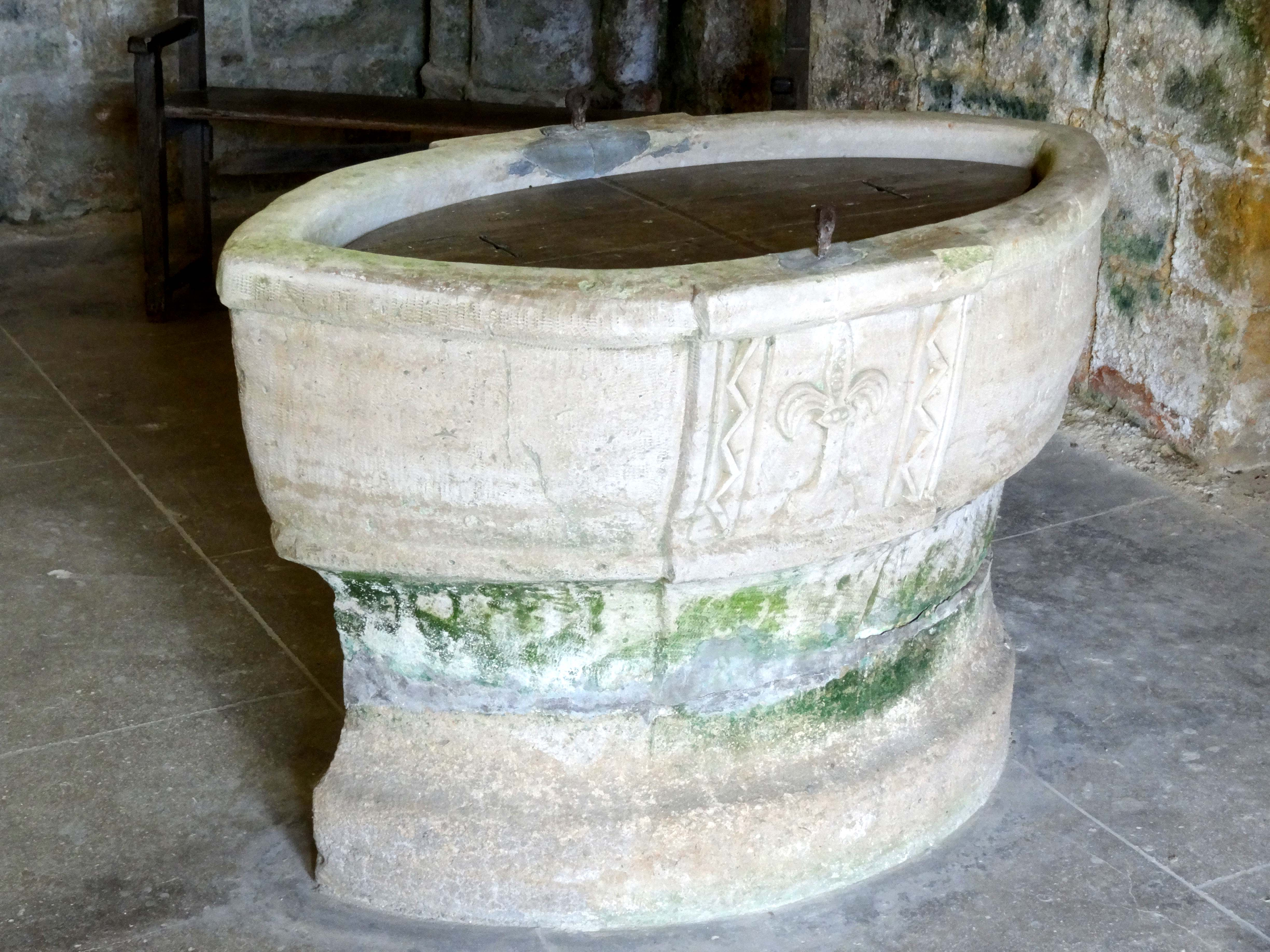 Mobilier de l'église - voir titre.